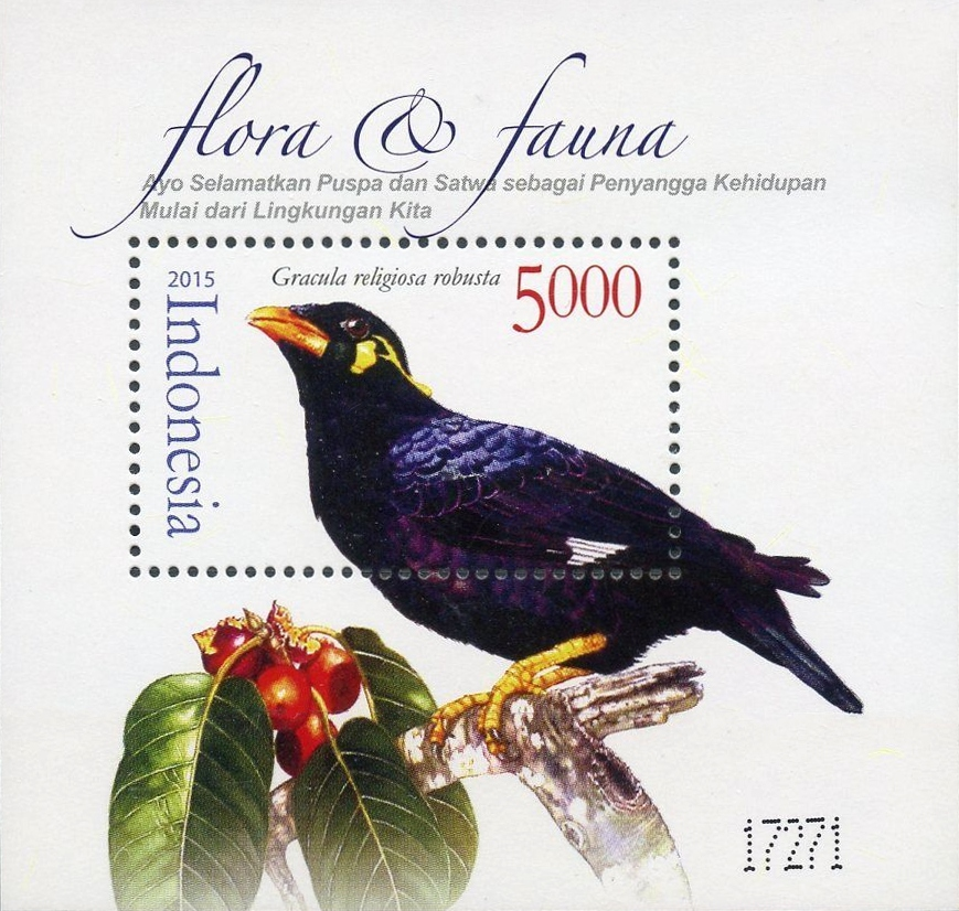 Gracula religiosa robusta